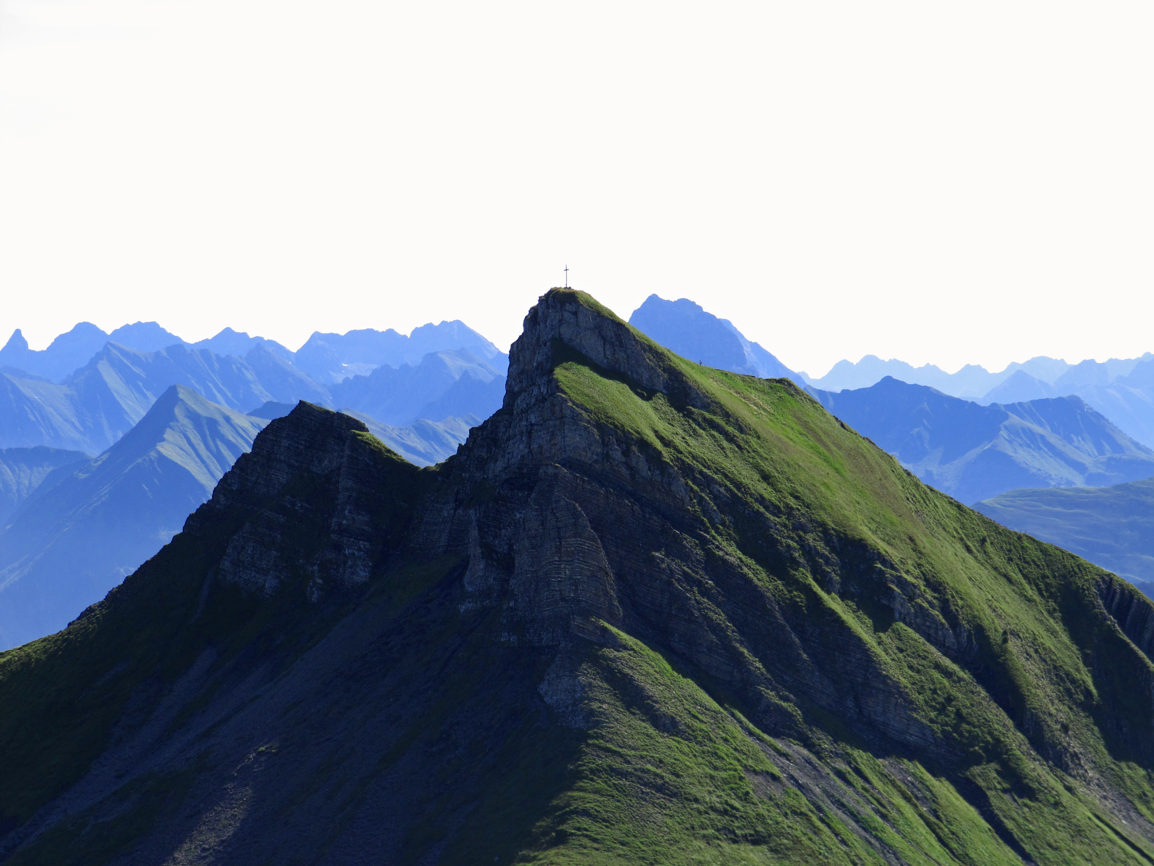 Damuelser Mittagspitze Panorama